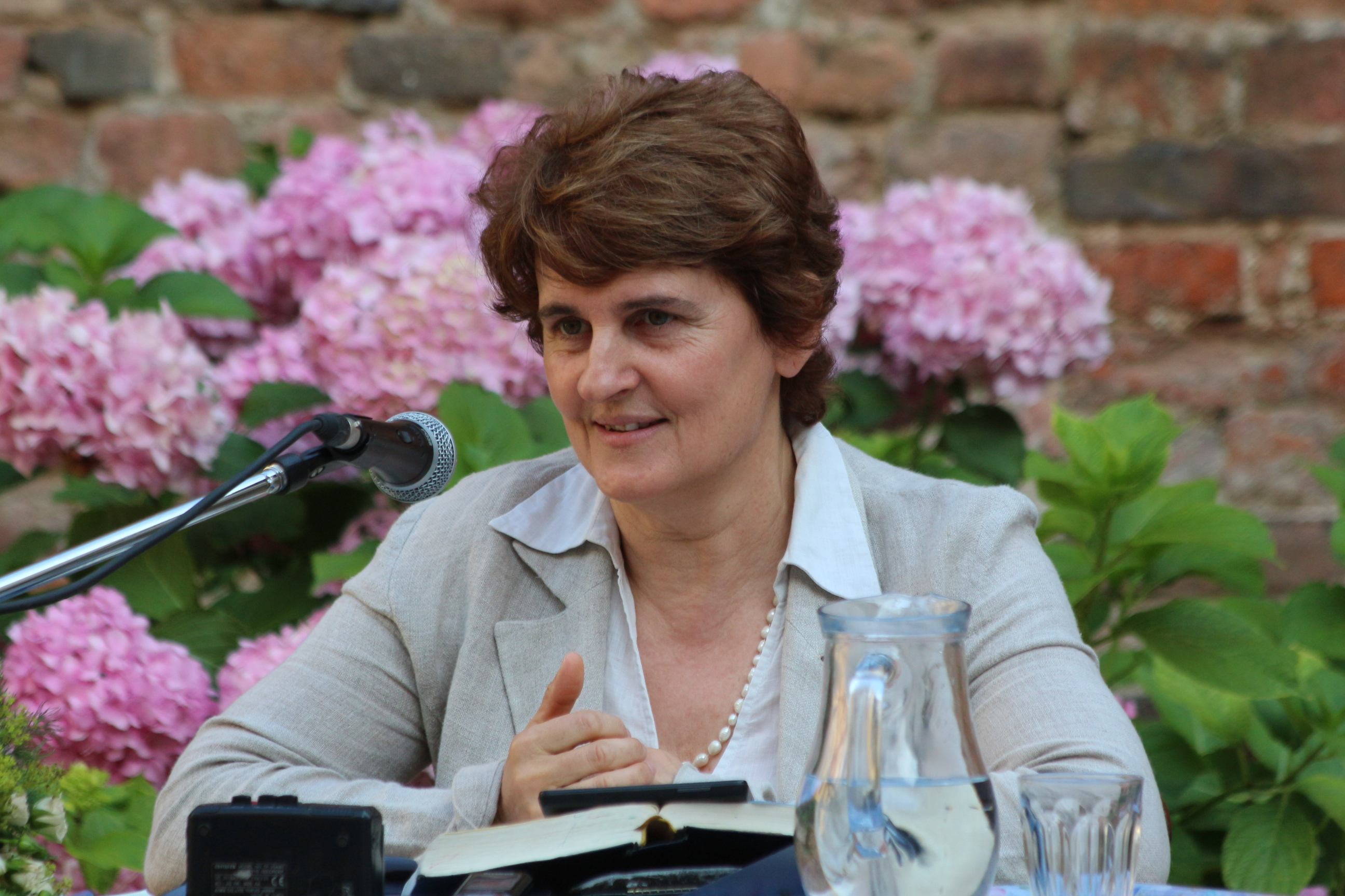 Rosanna Virgili